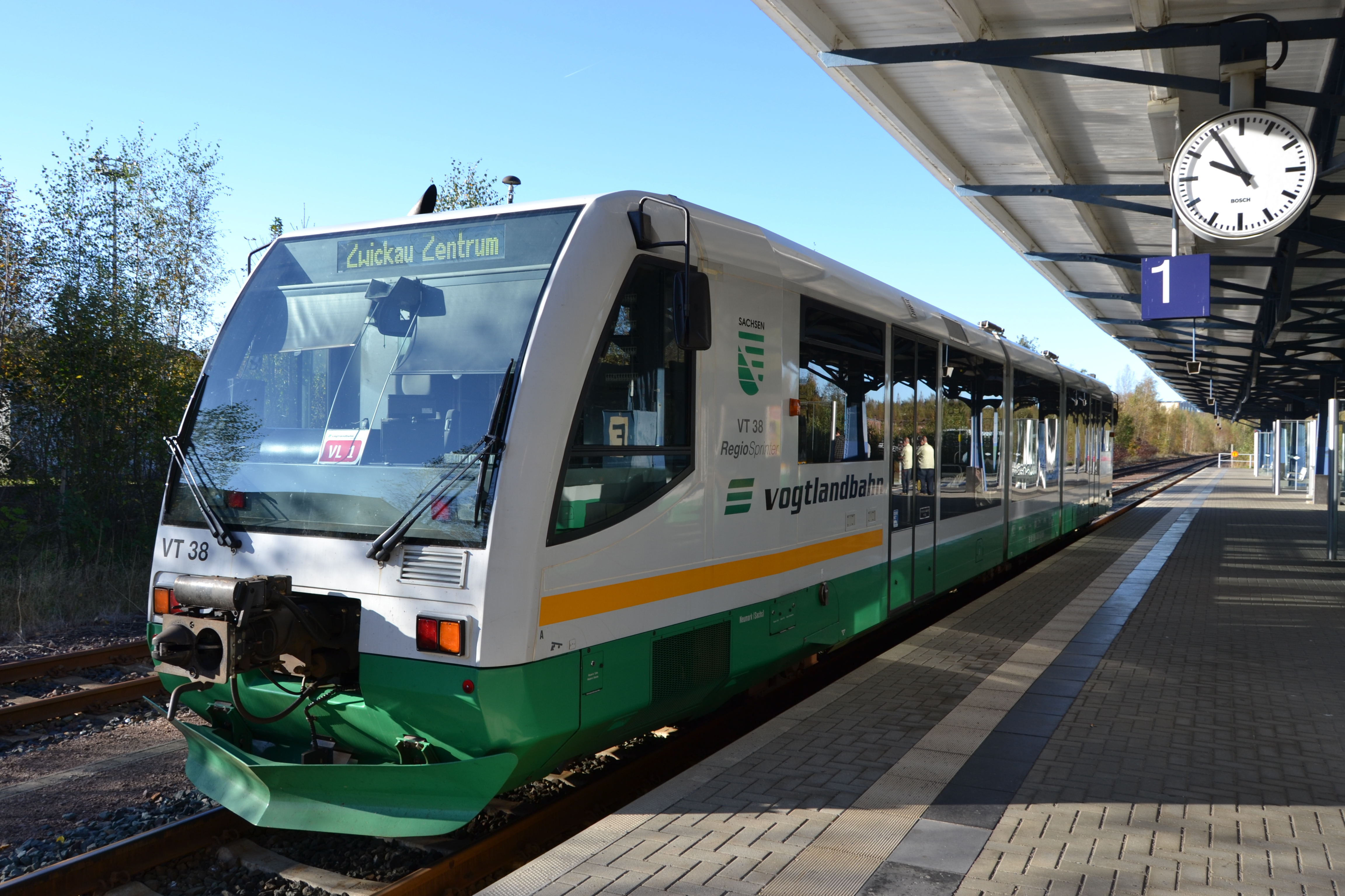 Vogtlandbahn